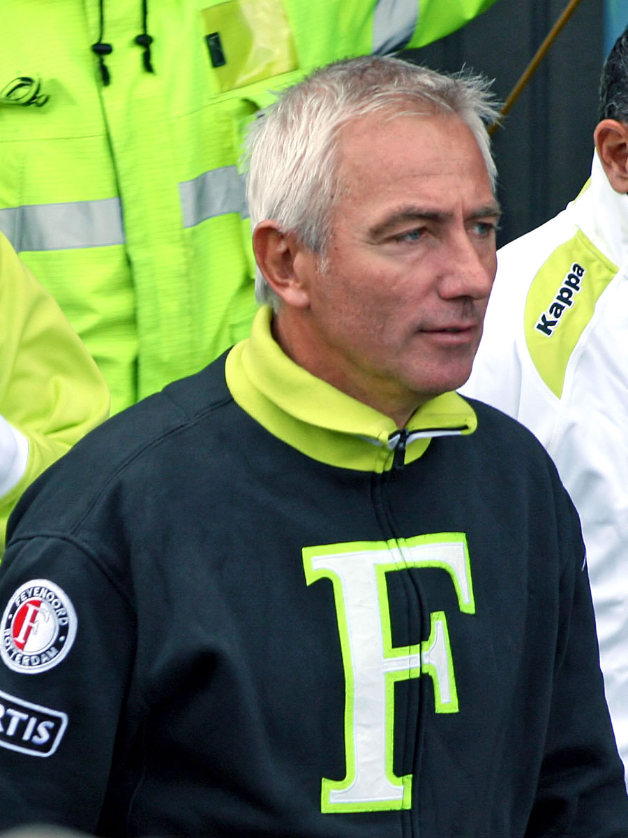 Bert van Marwijk (Feyenoord)